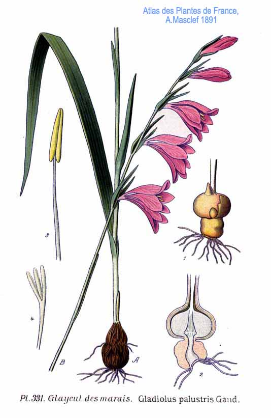 Gladiolus palustris Gand.